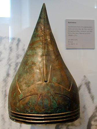 Spitzhelm 8. Jahrhundert v.Chr. Badisches Landesmuseum Karlsruhe. Eigene Aufnahme vom 12.06.2004.